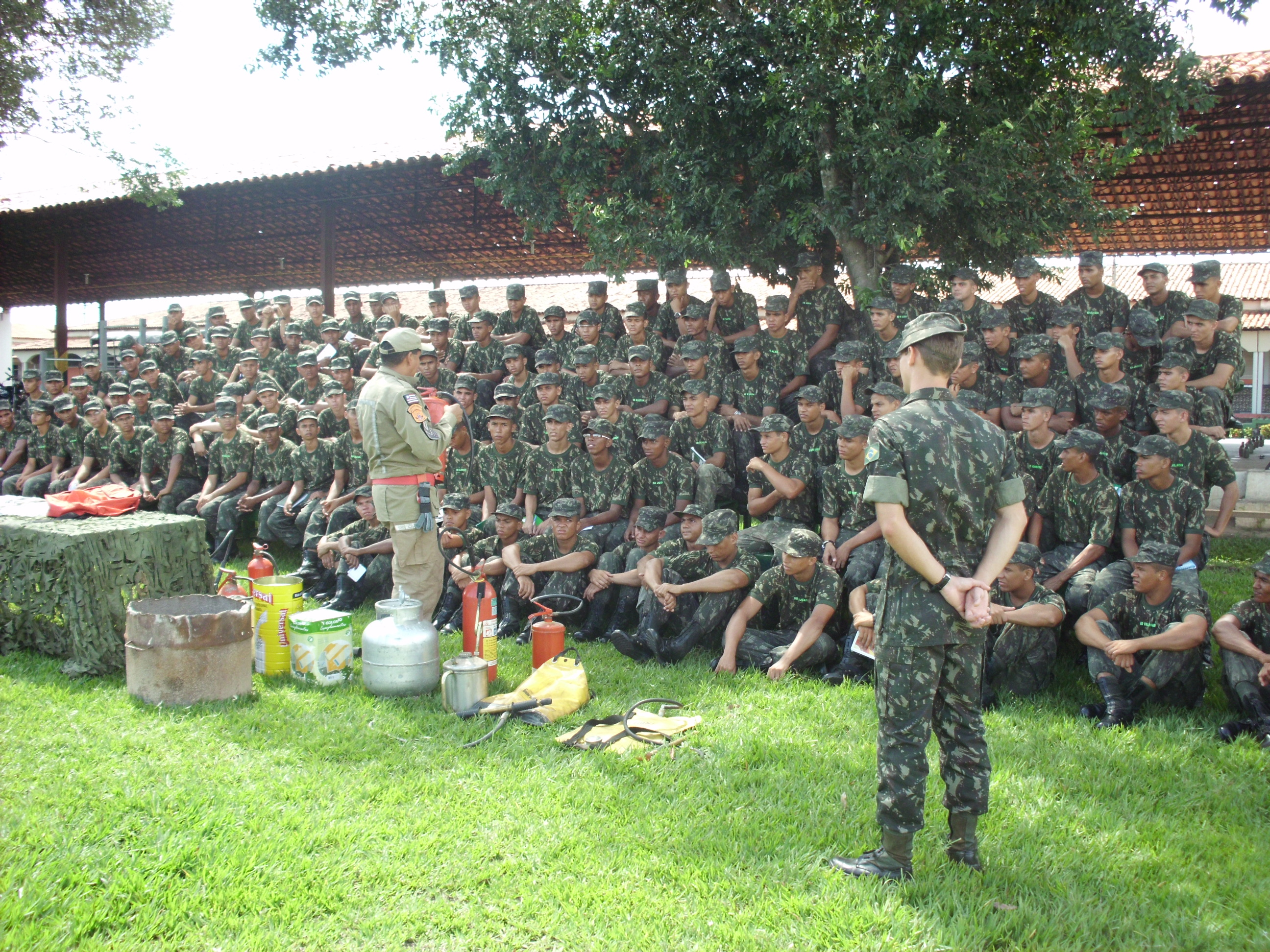 Recrutas do 50º Batalhão de Infantaria de Selva (50 BIS)